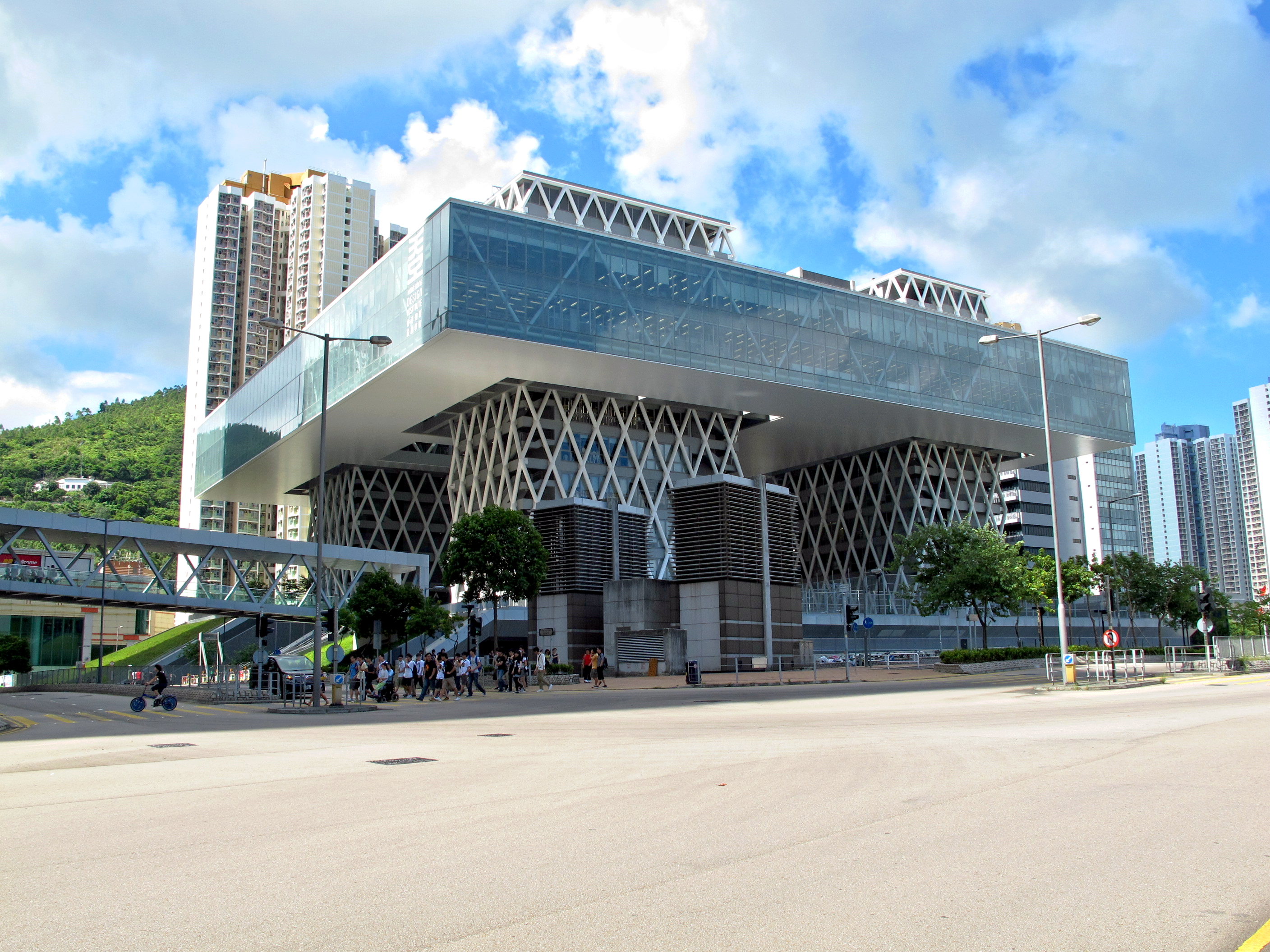 Hong Kong Design Institute Campus 香港知專設計學院